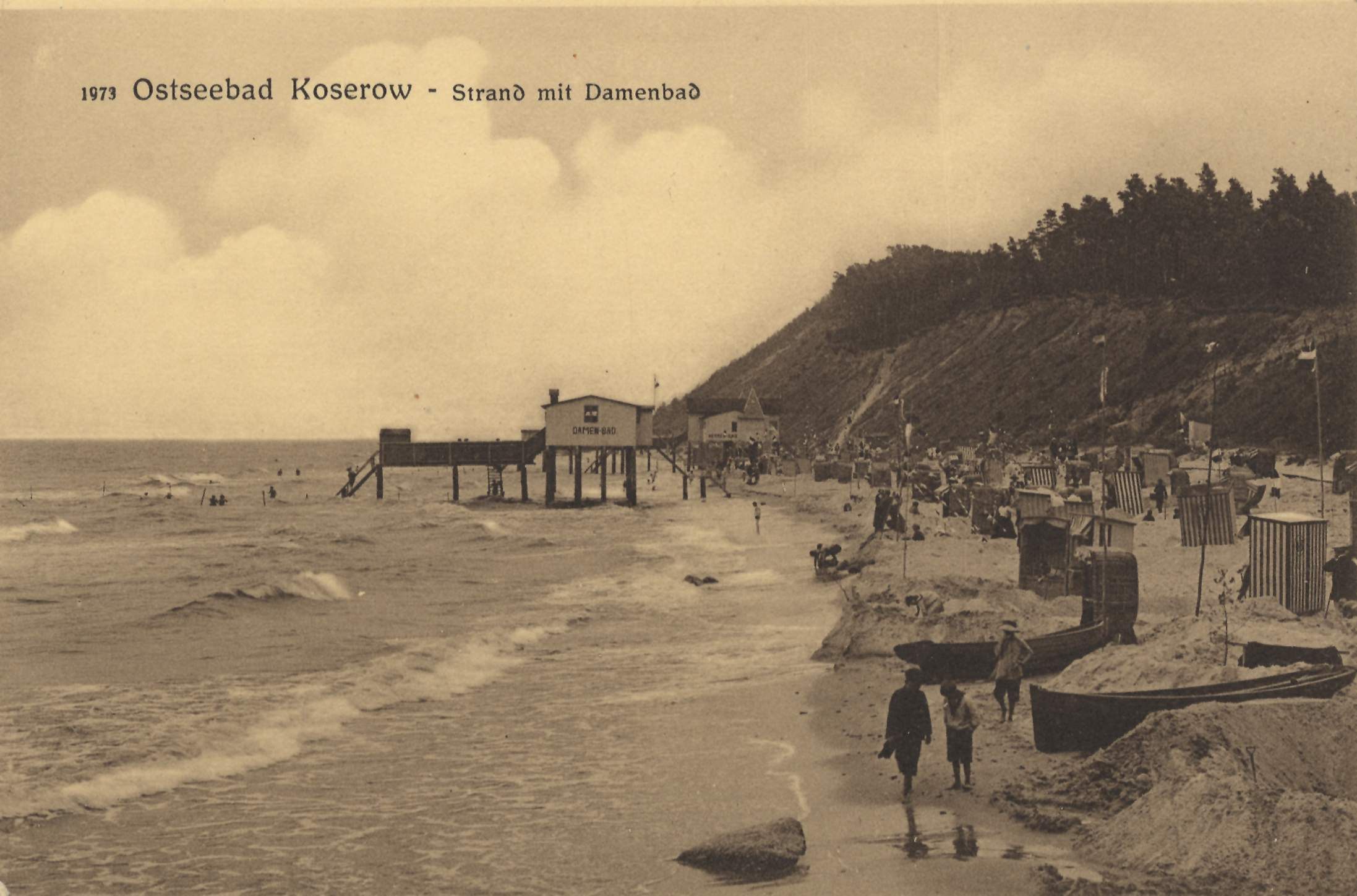 Ostseebad Koserow - Strand mit Damenbad